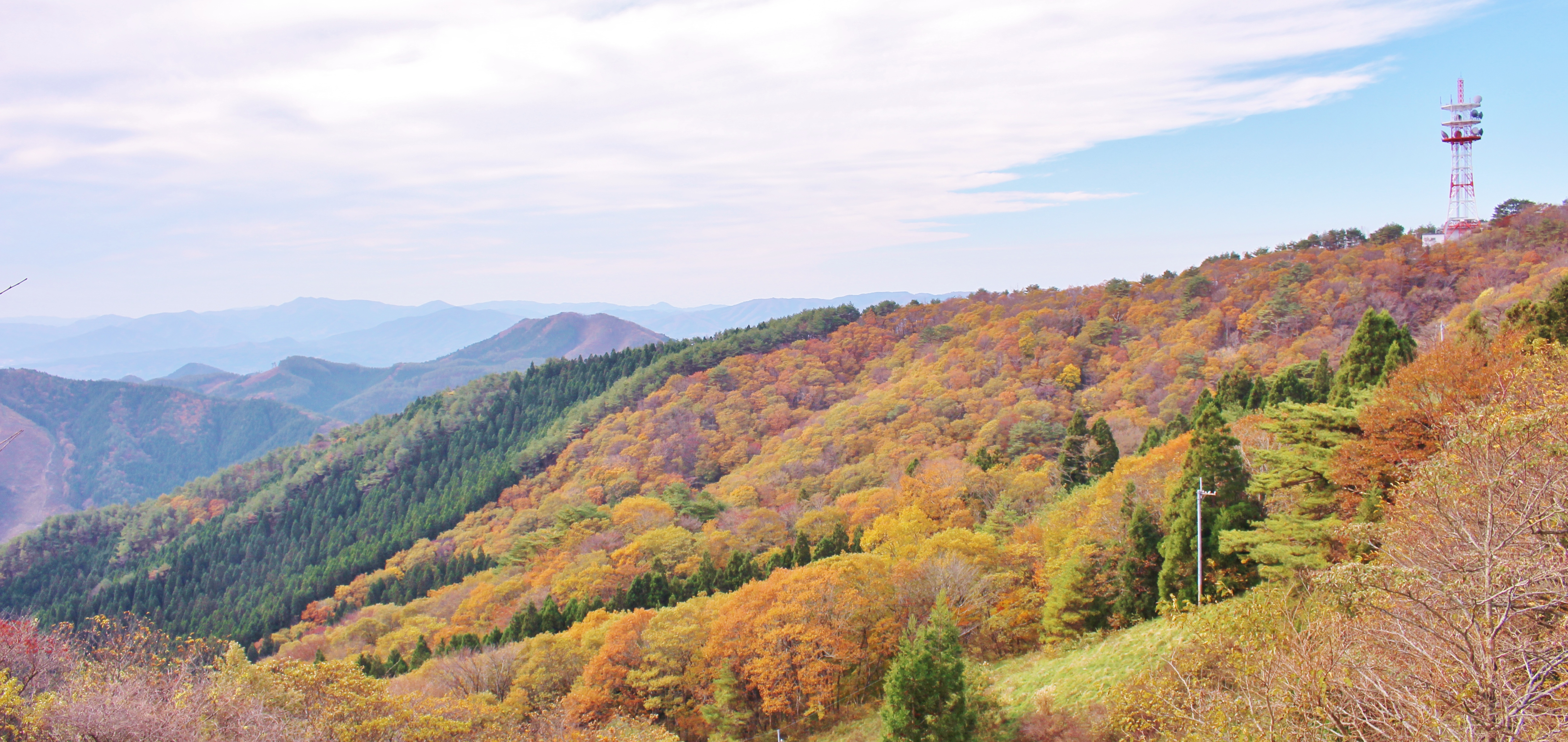 紅葉の田束山